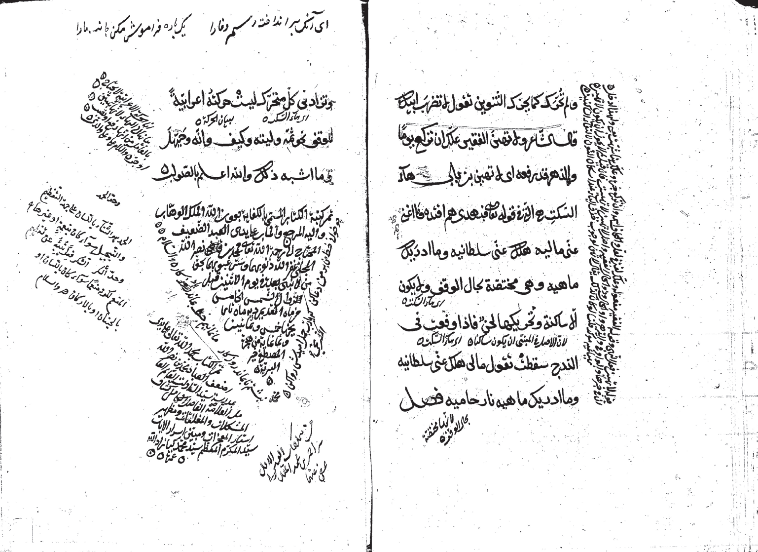 اشعار طبری در نسخۀ خطی «الکفایة فی علم الاعراب» در لینک نسخ خطی مشاهده شود.